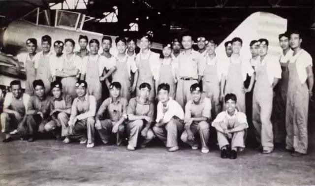 雷允厂工人合影